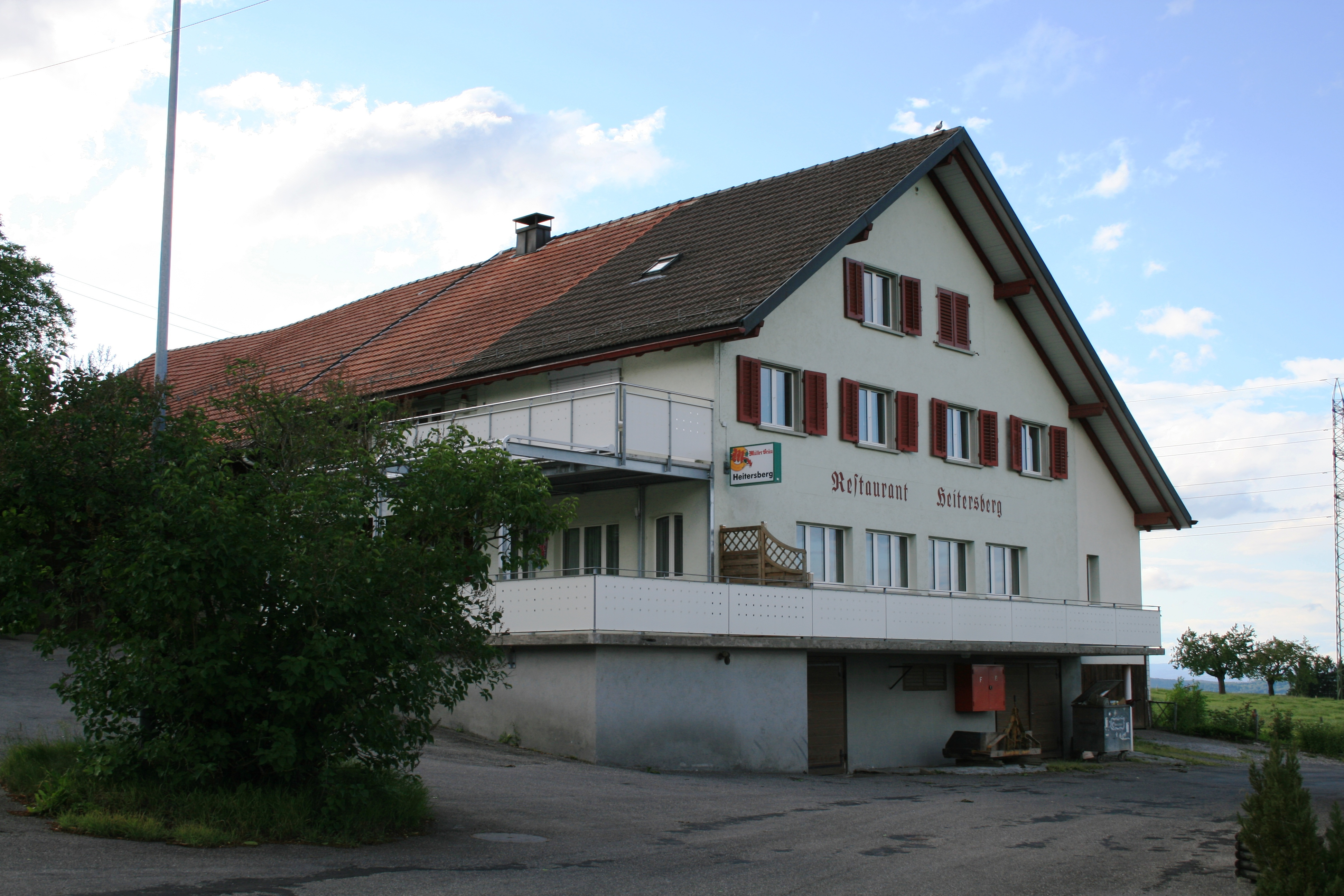 Restaurant "Heitersberg", Weiler Heitersberg (Gem. Spreitenbach), Schweiz